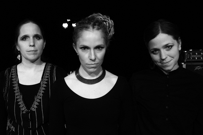 Akosia och Sister Sunshine